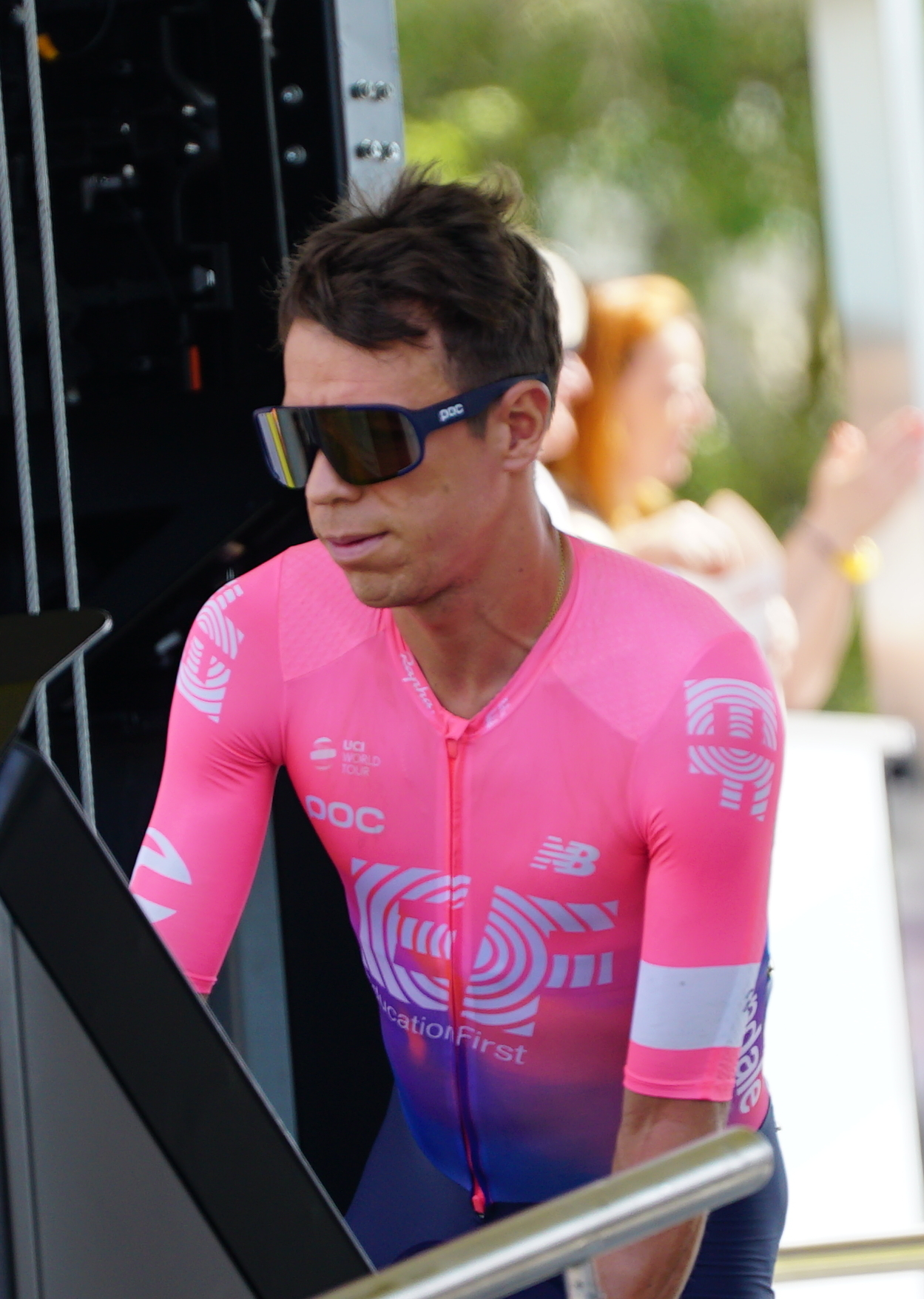 à Reims lors de la quatrième étape.